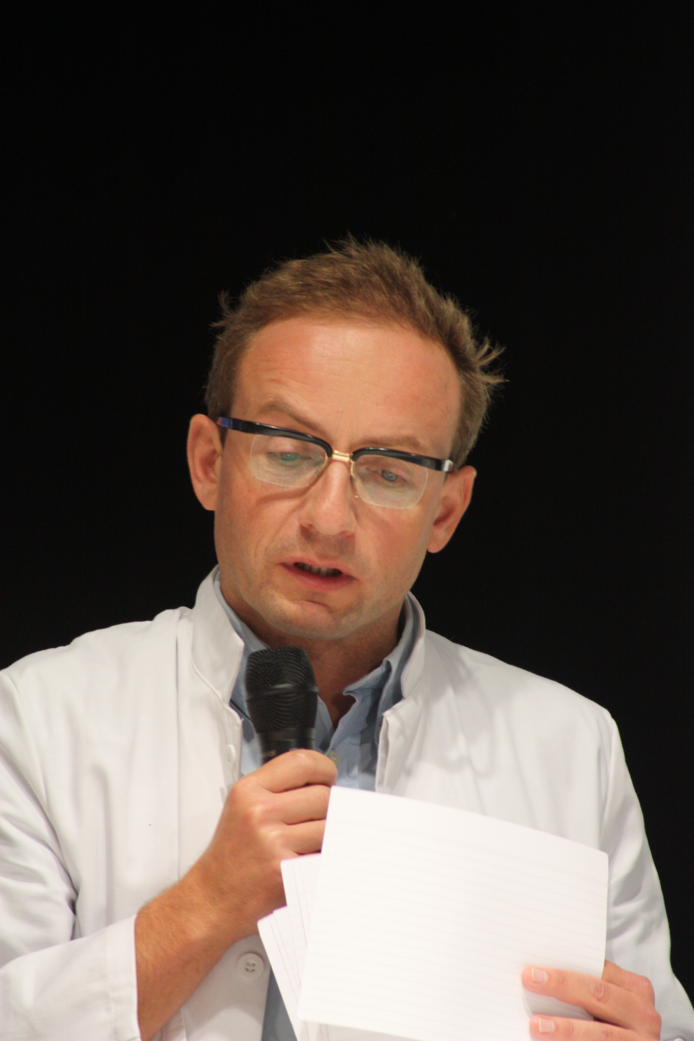 IFA 2010, Berlin